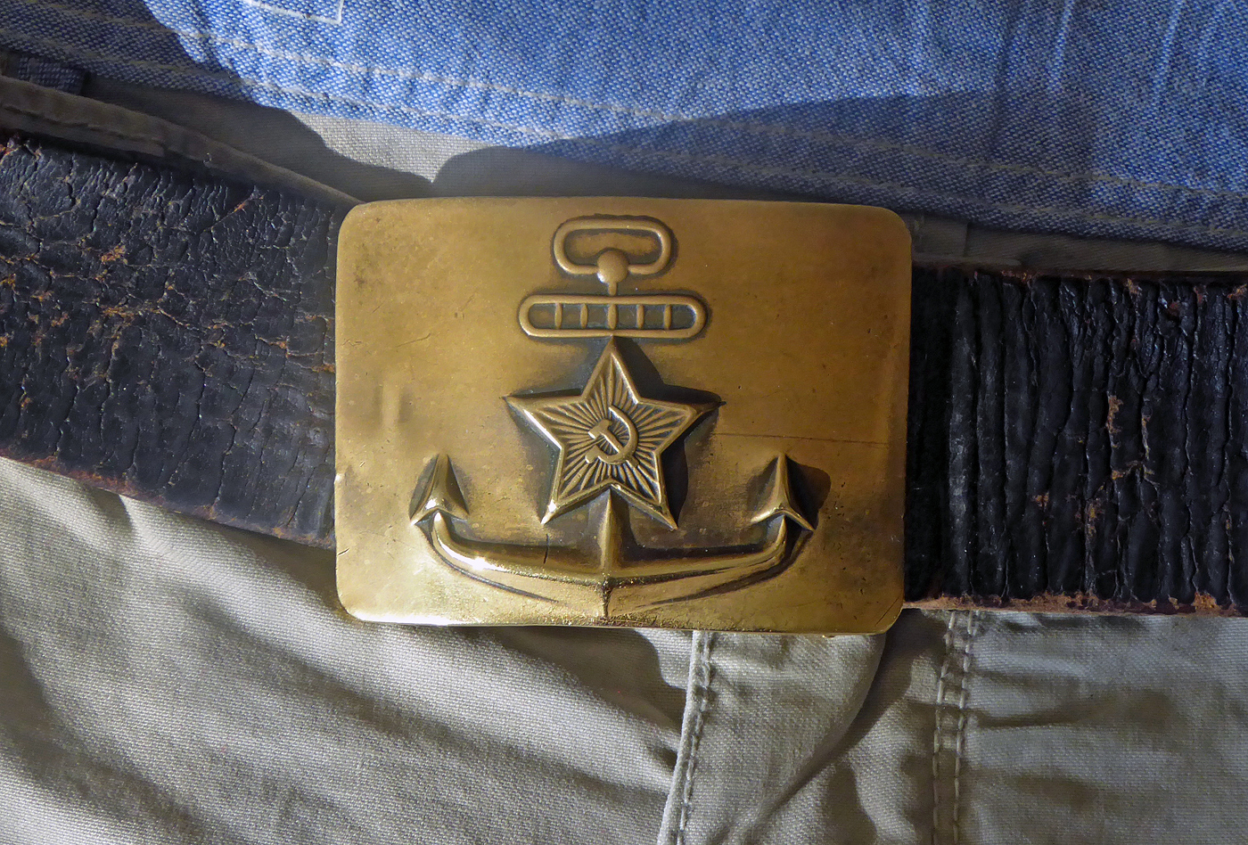 Ett bältespänne från Ryska marinen.